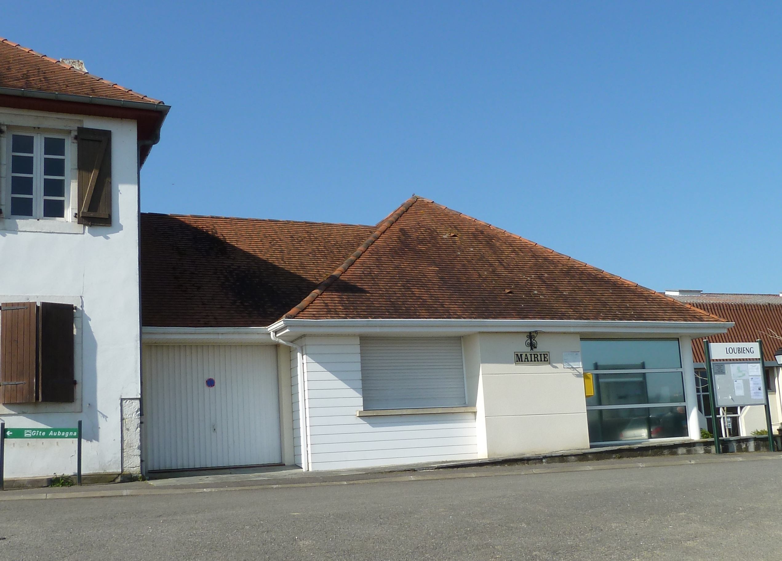 Mairie de Loubieng